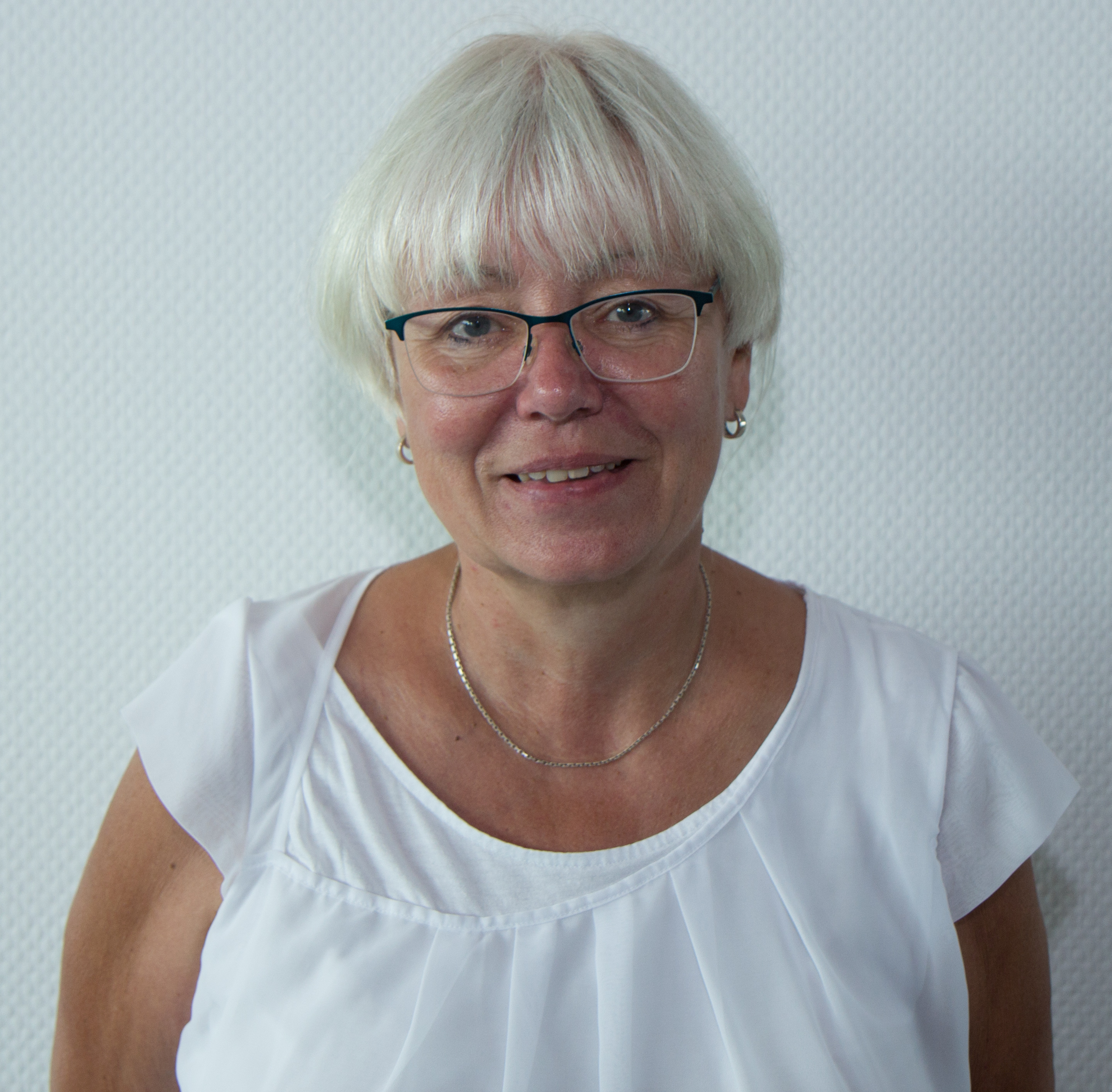 Barbara Hahn: Pressekonferenz im rheinland-pfälzischen Ministerium für Wissenschaft, Weiterbildung und Kultur am 7. August 2018 in Mainz.